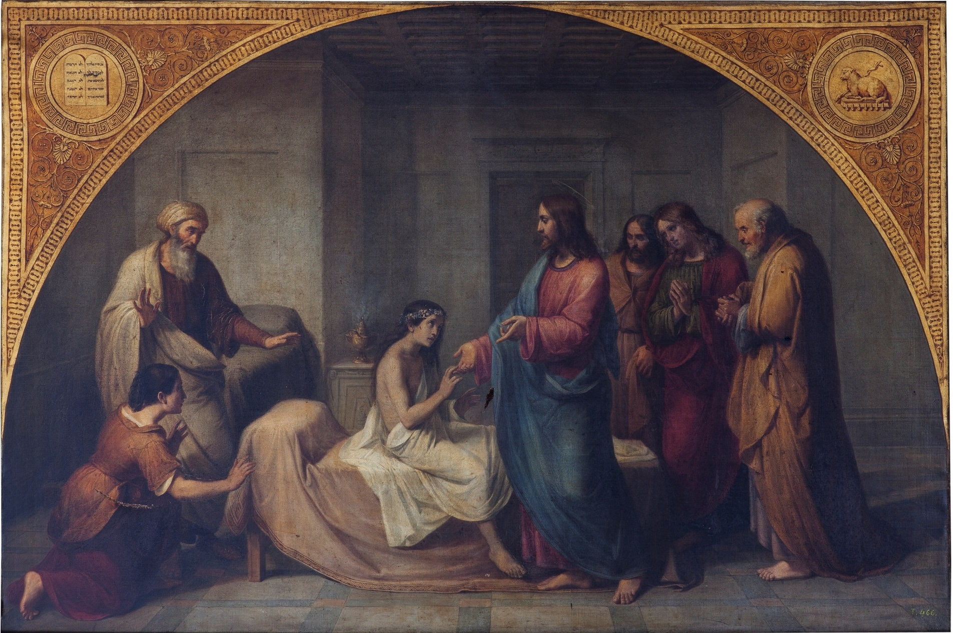 La obra representa La resurrección de la hija de Jairo, que fue uno de los milagros realizados por Jesucristo y que está consignado en el Nuevo Testamento.